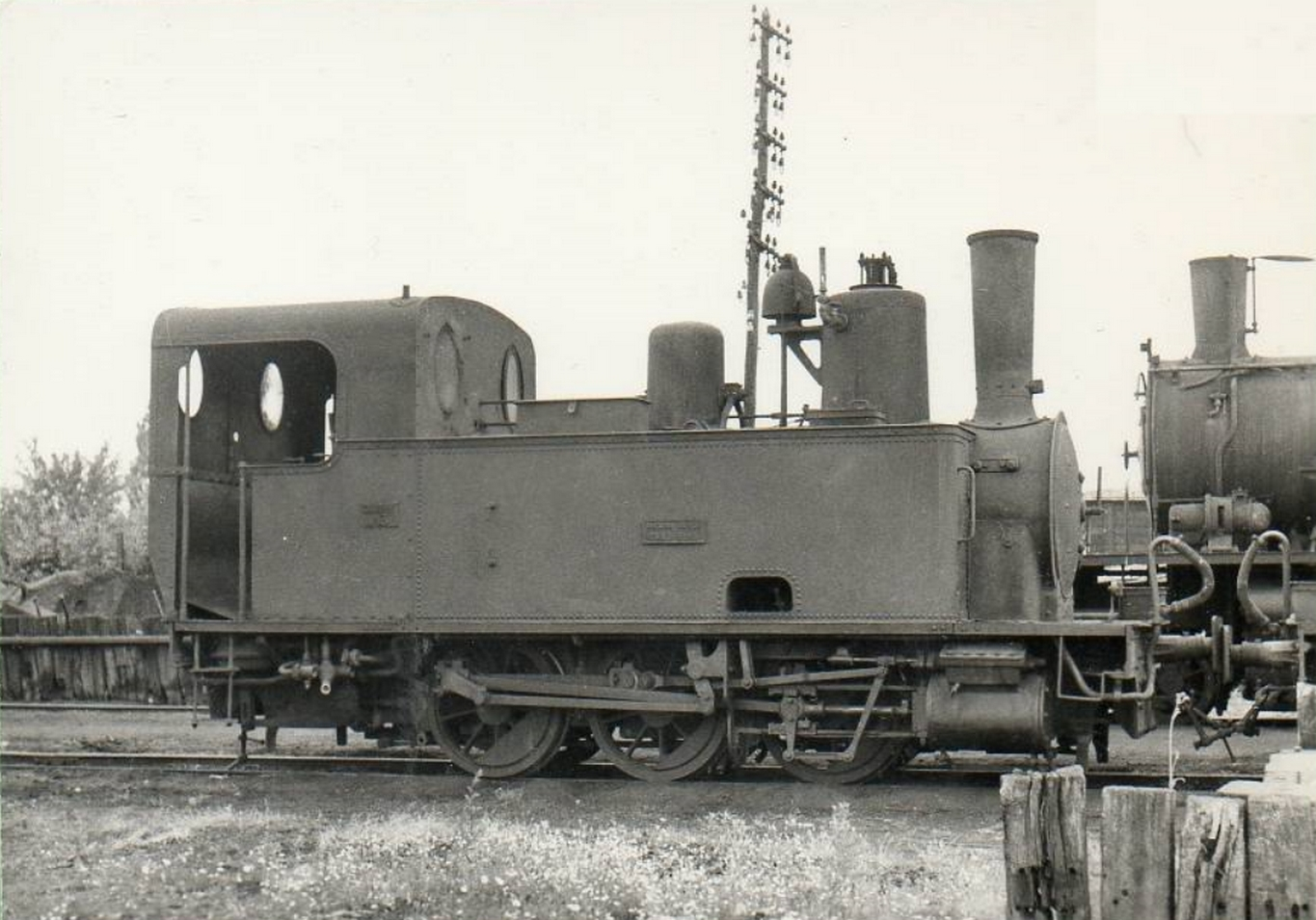 Locomotive des Chemins de fer du Cambrésis, Caudry, Nord, Nord-Pas-de-Calais, France.